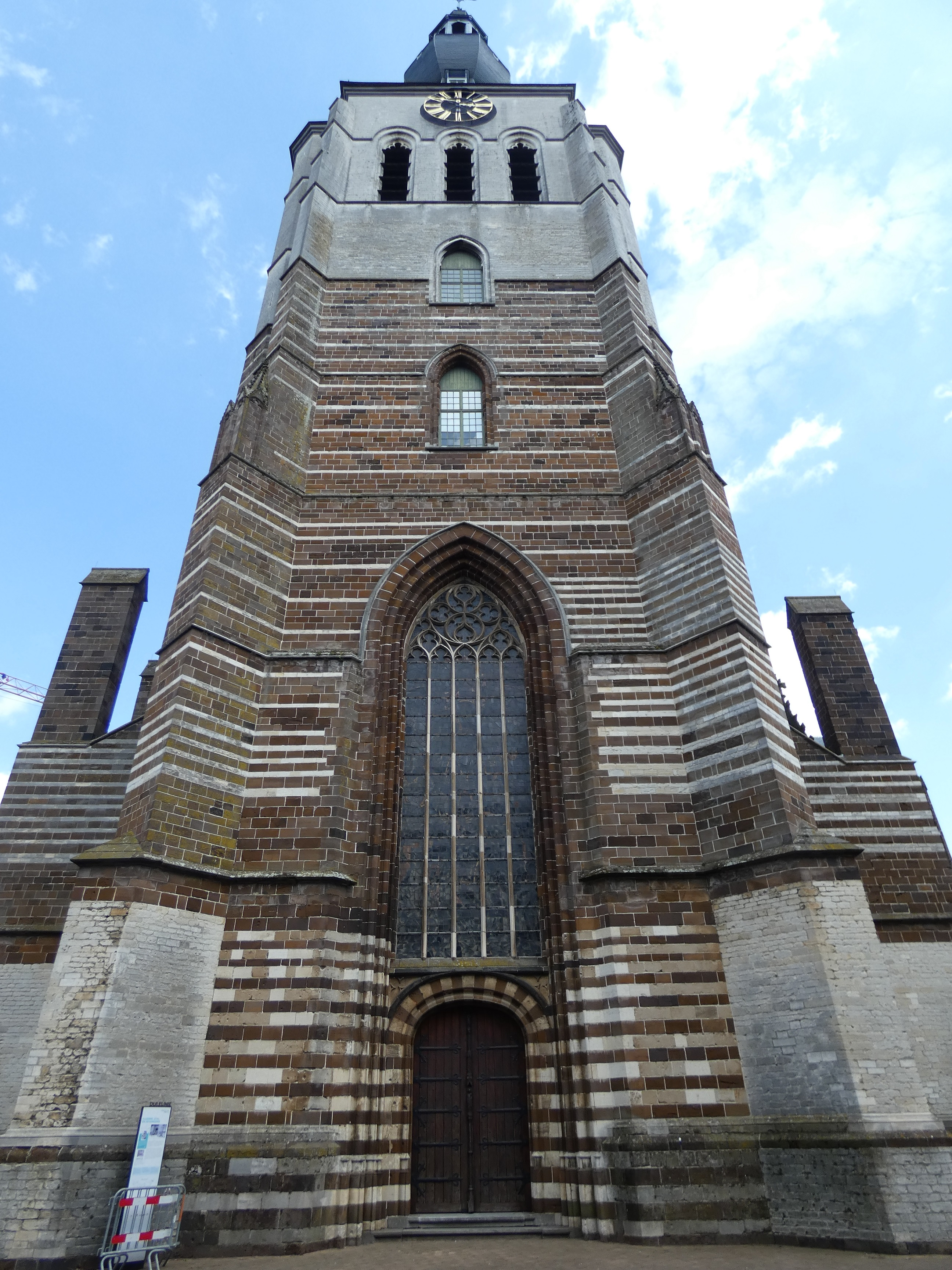 Onze-Lieve-Vrouwetoren van Aarschot, gebouwd in de eerste helft van de 15de eeuw. De typische speklagenversiering is duidelijk te zien. Deze bestaat uit een combinatie van witte zandsteen uit Gobertingen, baksteen en ijzerzandsteen.